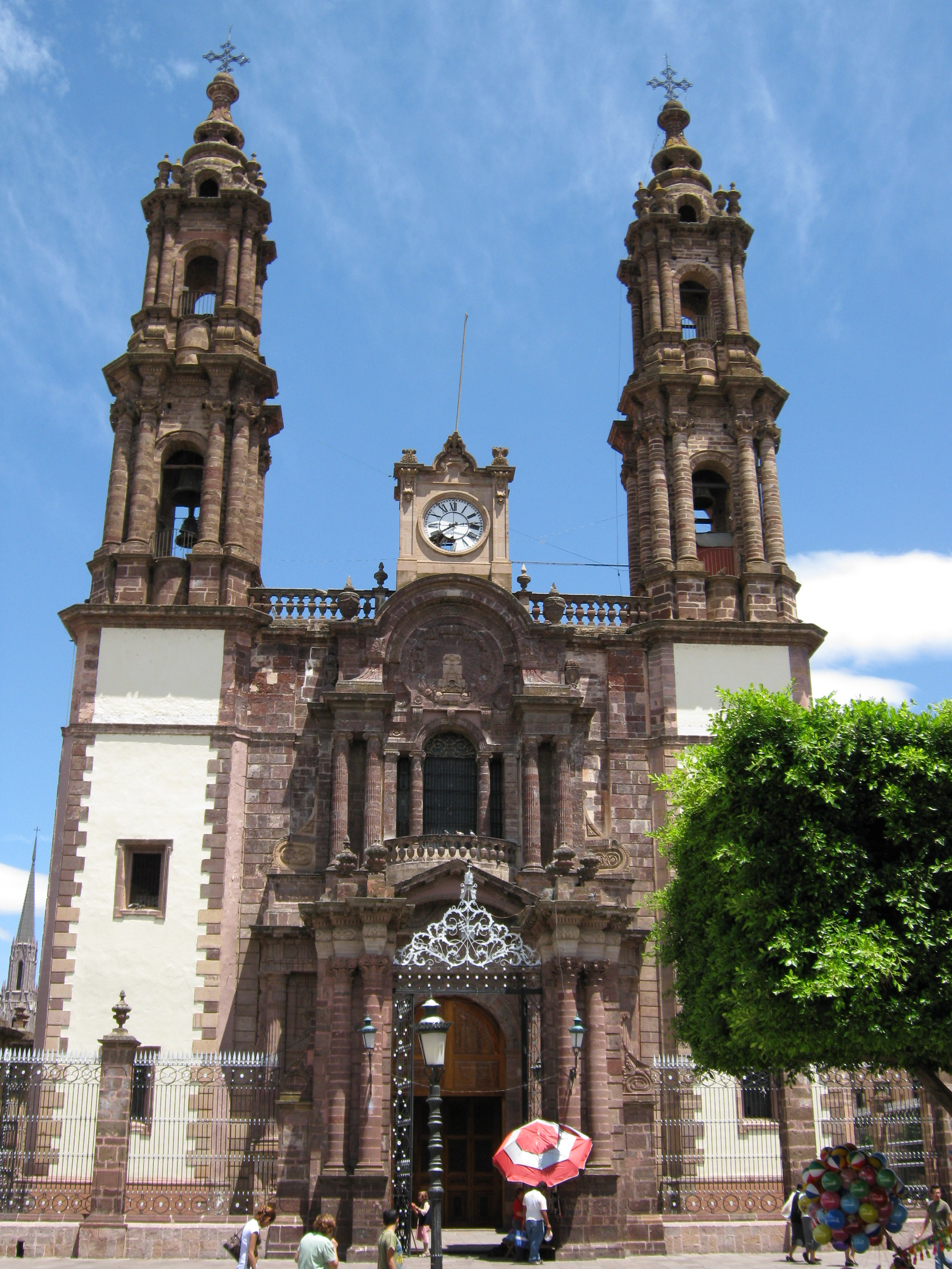 Catedral de Zamora, Michoacán